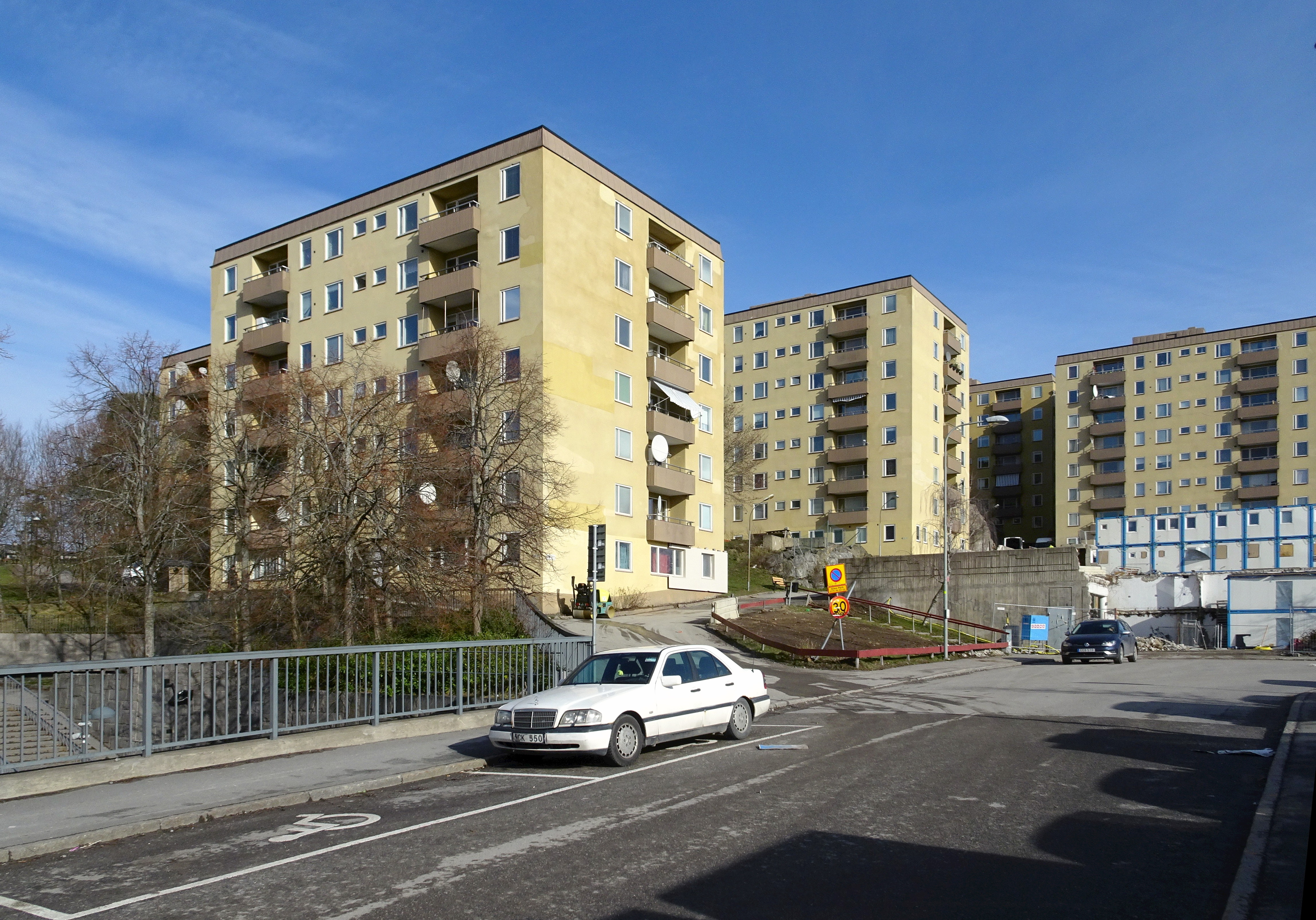 Kvarteret Hemholmen. Archibald Frid (Arkitekt). Hansson & Höglund Byggnads AB (Byggherre). Olov Säll (Byggmästare), nybyggnadsår 1967-1968